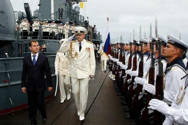 Во время посещения флагманского корабля Балтийского флота эскадренного миноносца «Настойчивый». С командиром эсминца Сергеем Чобитько.